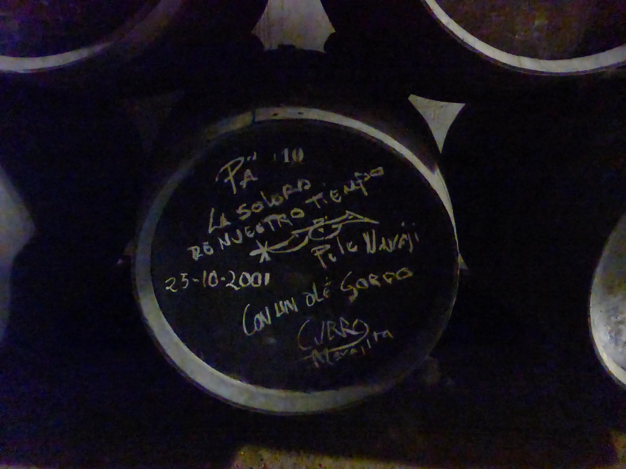 Bodegas Real Tesoro en Jerez de la Frontera